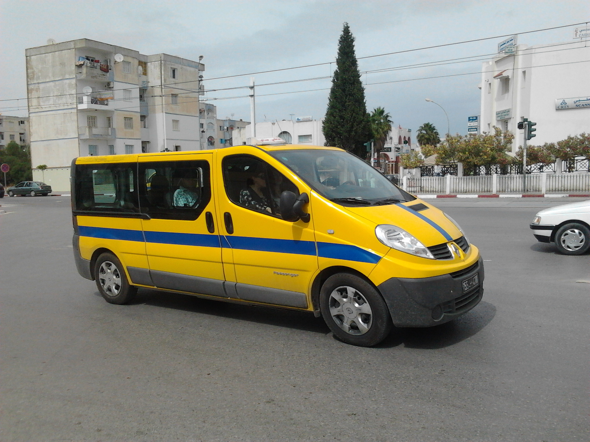 El Mourouj 1 - gouvernorat de Ben Arous - Tunisie Taxi collectif